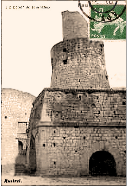 Haut fourneau de Rustrel, dans le quartier de Notre-Dame des Anges d'une capacité de 6 tonnes de fonte par jour.